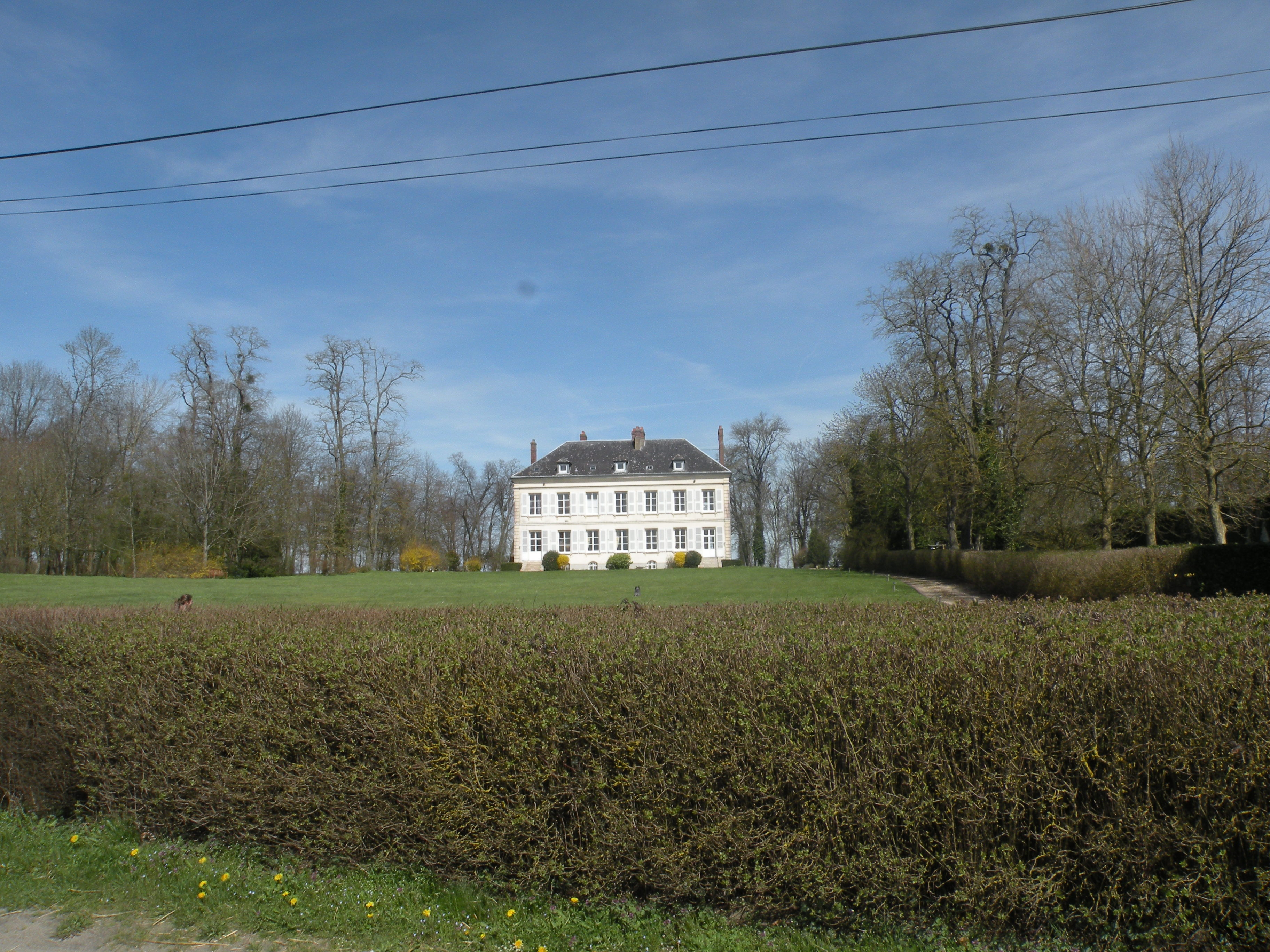 Fay-les-Étangs château